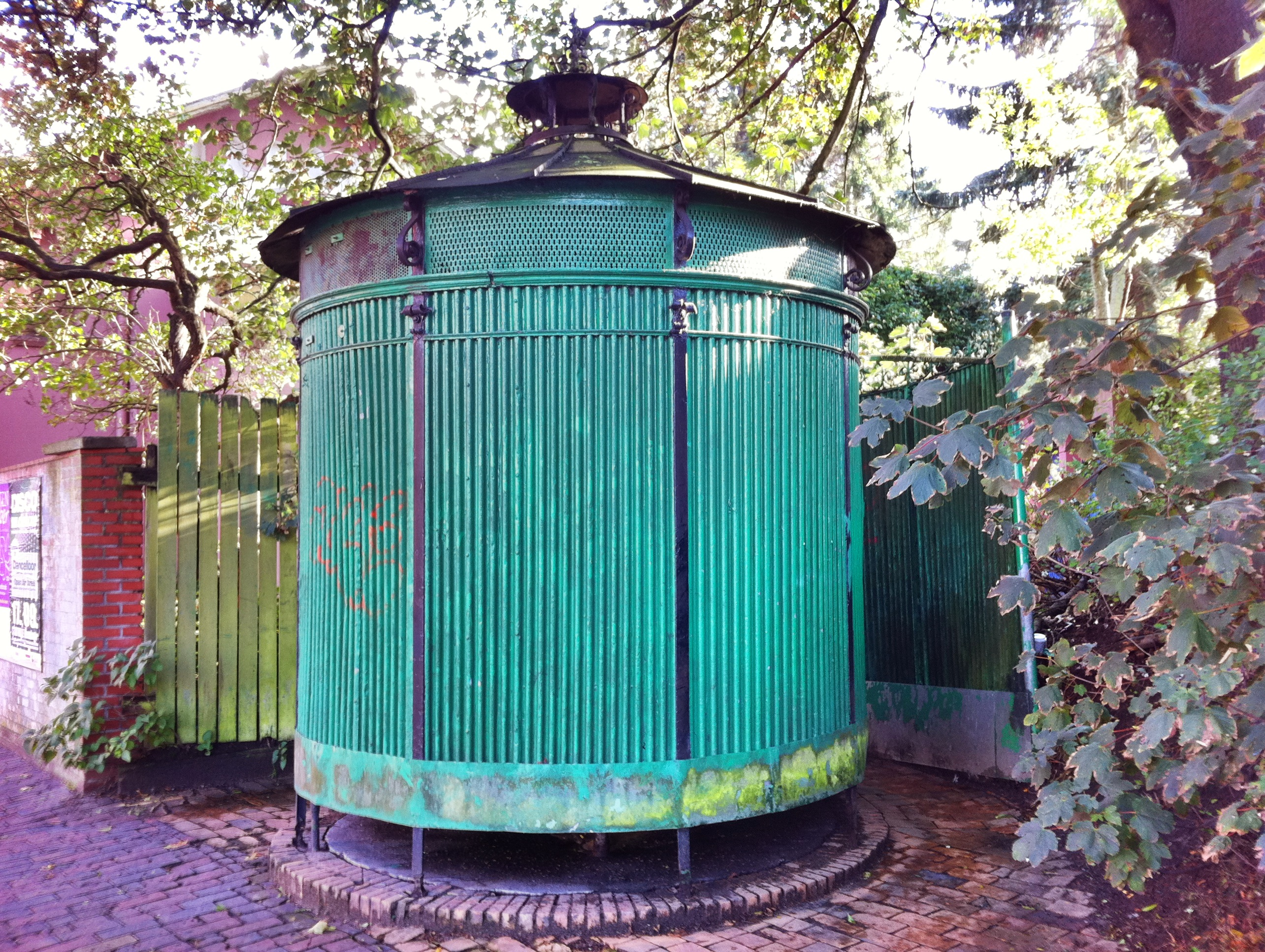 Historical Building: Urinal in Neumunster, Bahnhofsstrasse 2